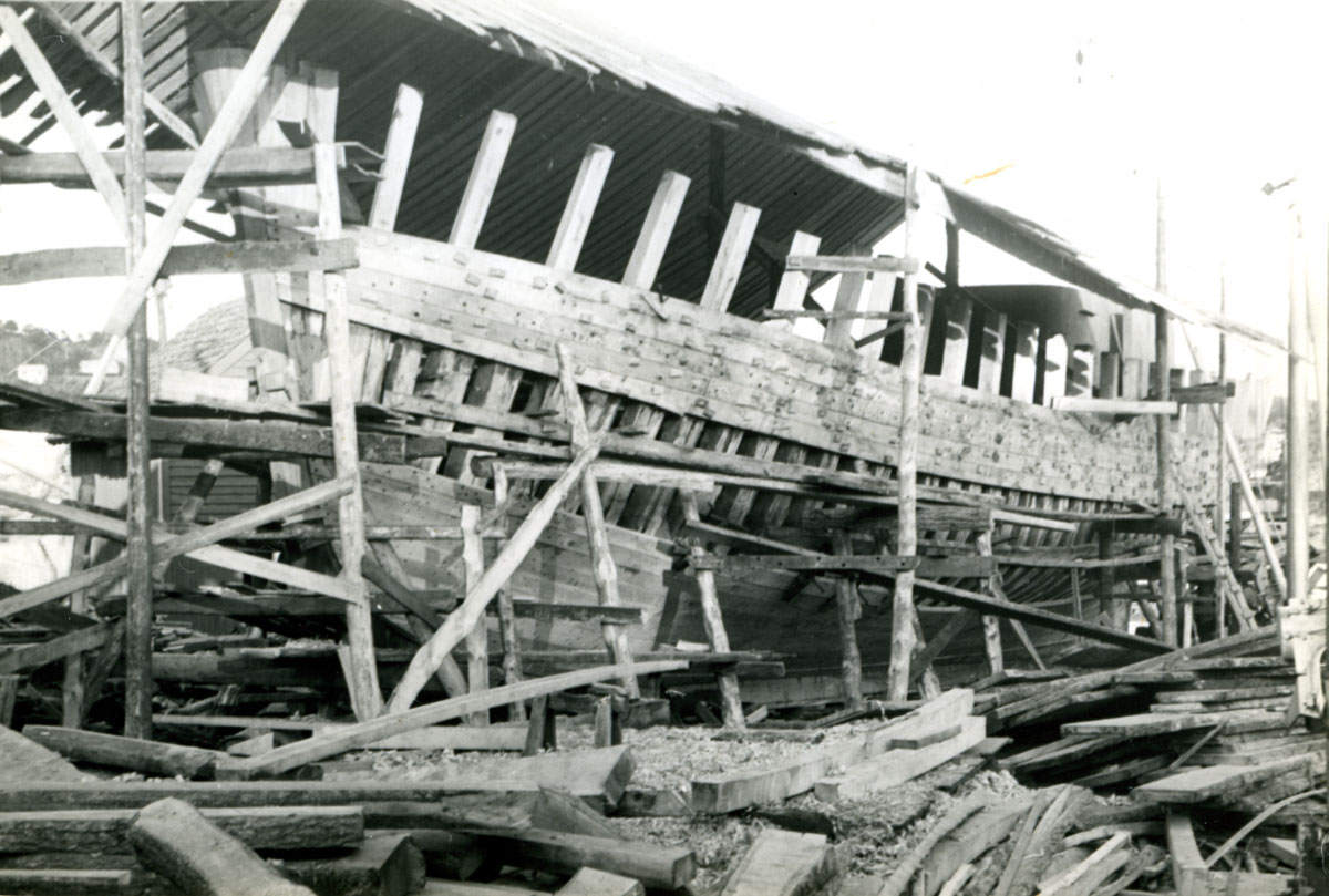 Skip under bygging på Ottesens Skipsbyggeri på Jensaneset, Sagvåg, i Stord kommune. Ukjent fotograf.